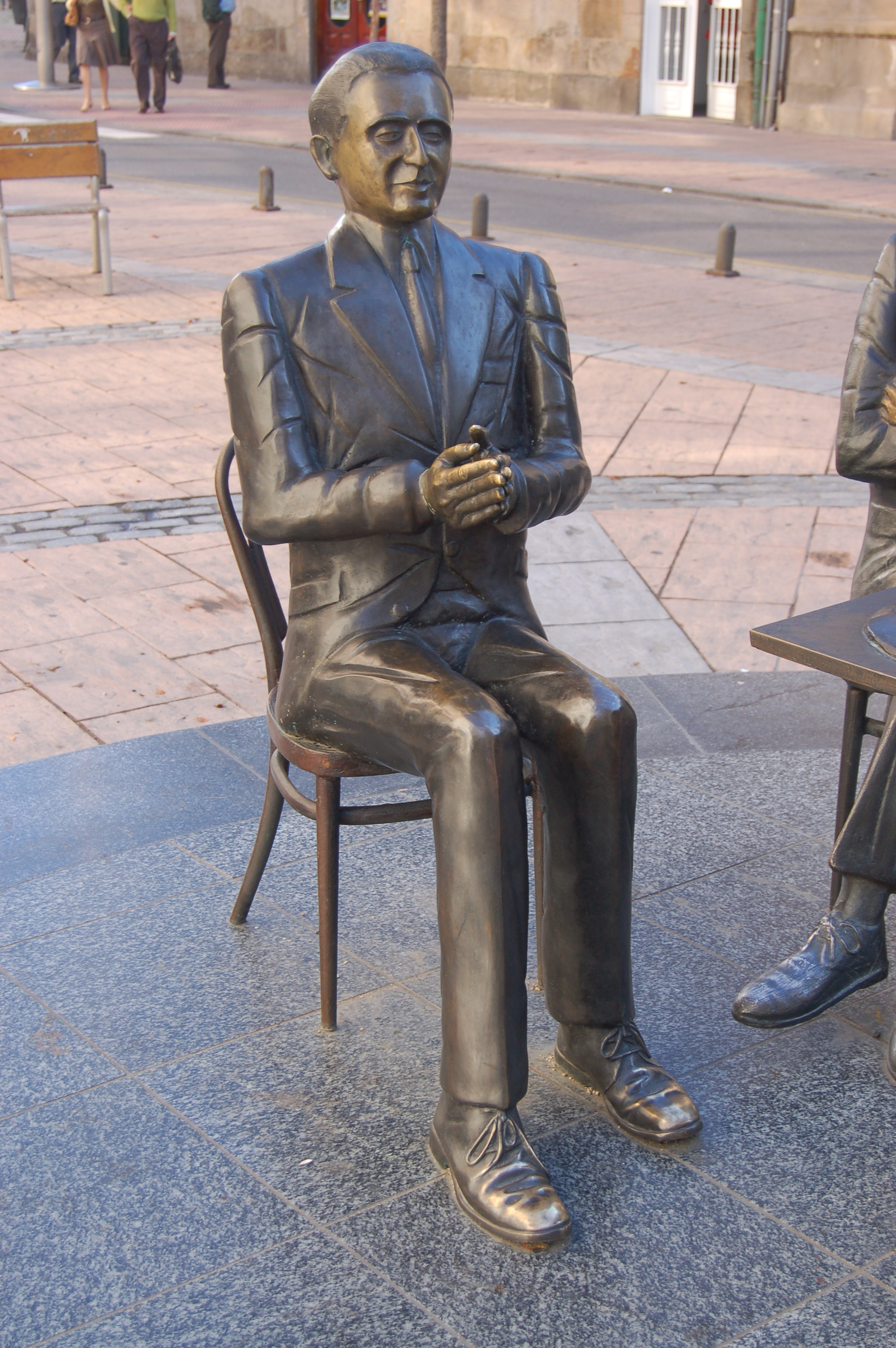 Estatua de Alexandre Bóveda en Pontevedra